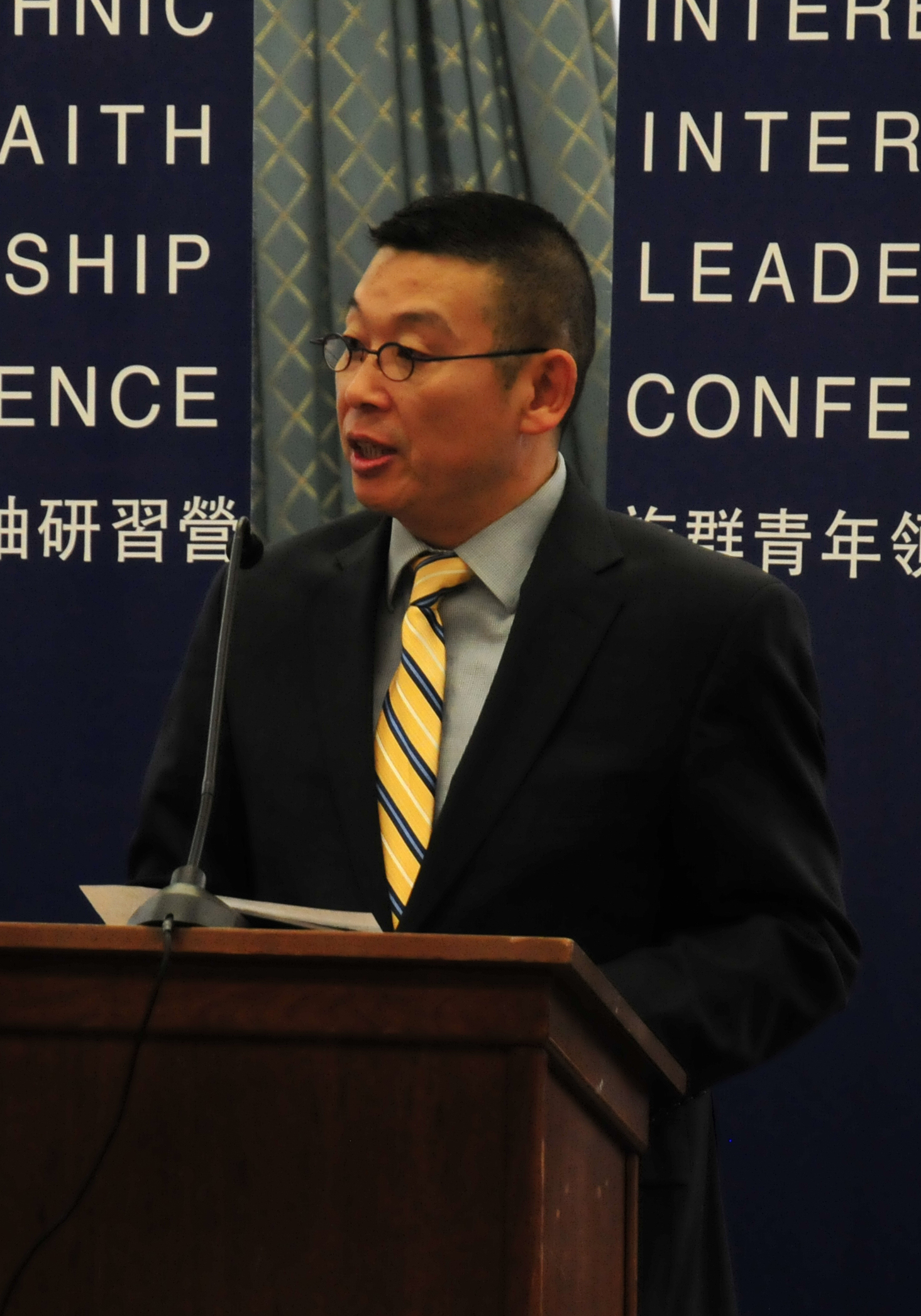 裁边后图片：杨建利博士在第十三届族群青年领袖研习营开幕式上演讲。美国国会Rayburn众议院办公楼。2018年12月10日。